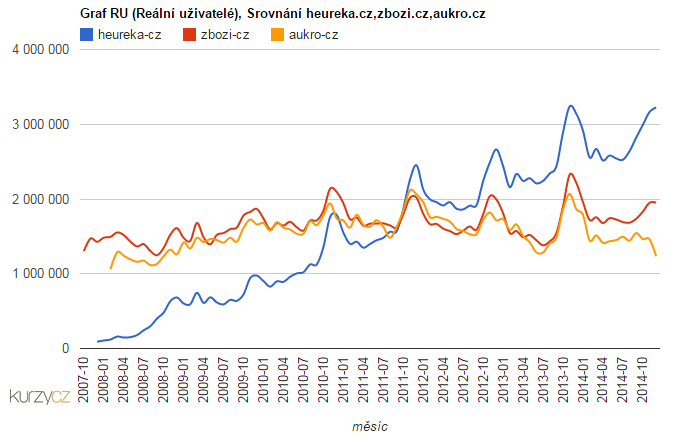 Porovnání návštěvnosti heuréka.cz, zboží.cz a aukro.cz